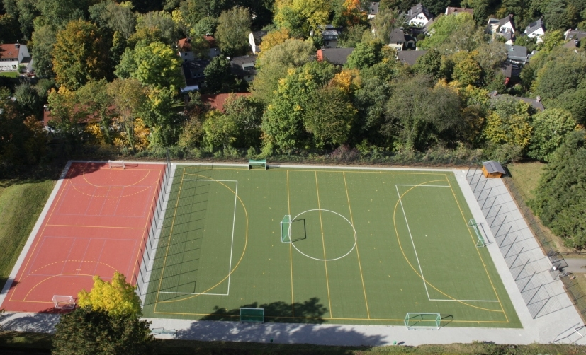 Luftbild vom Fußballplatz des Aloisiuskollegs Bonn (Luftbild)